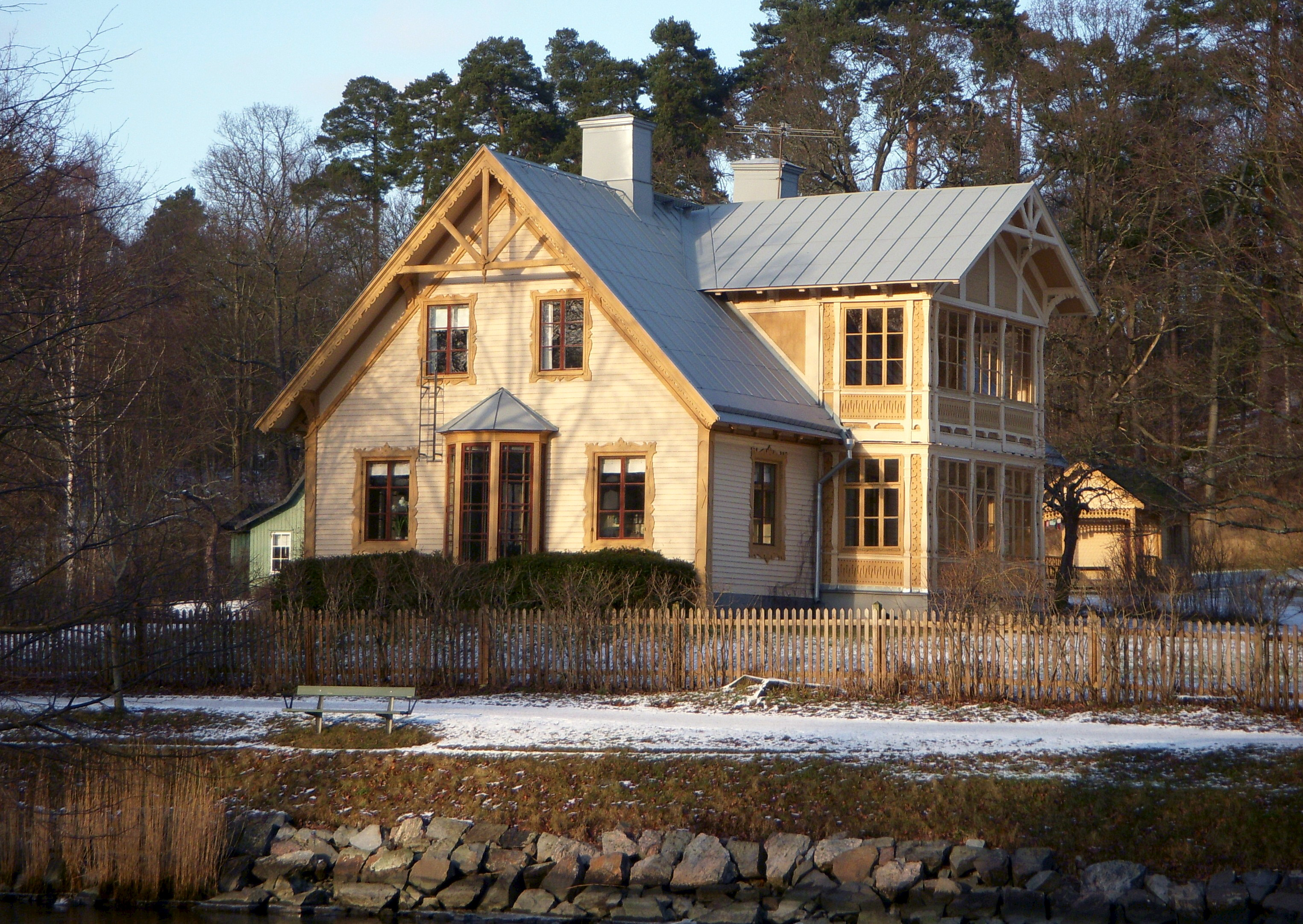 "Villa Johansdal" fasad mot sydost